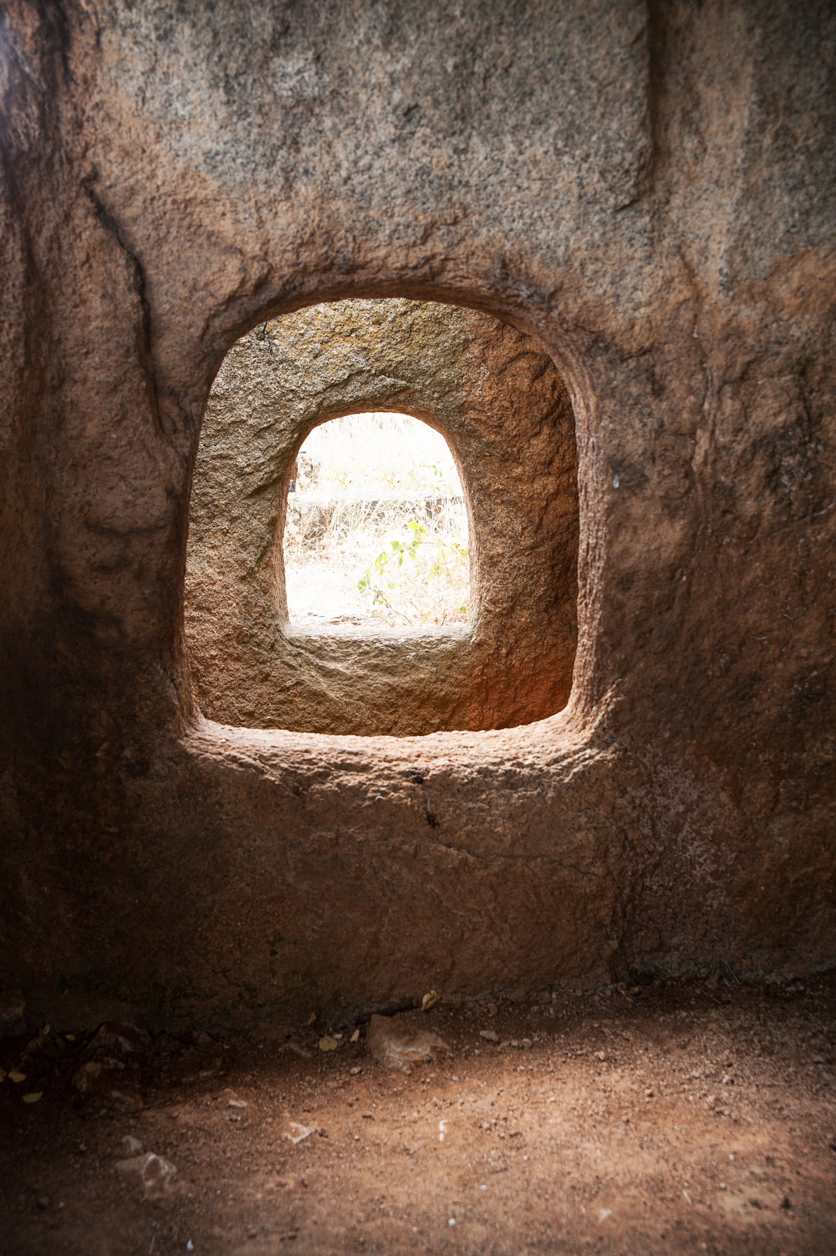 Долменът до с. Хлябово, м. Нъчеви чаири